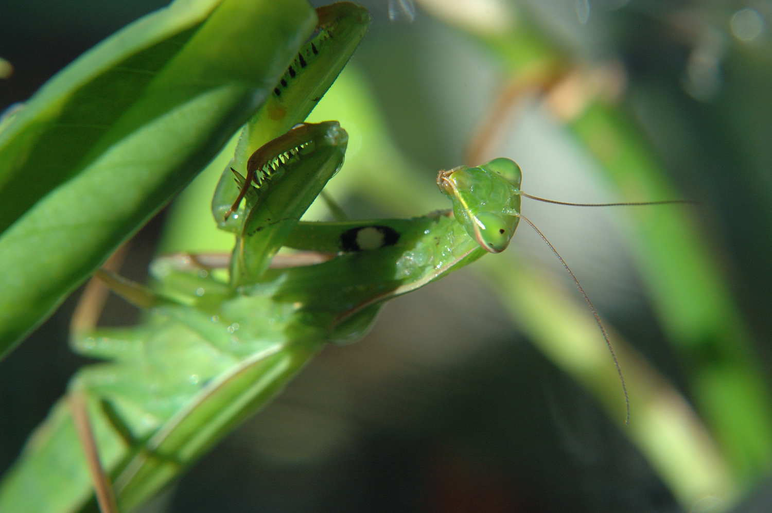 praying mantis